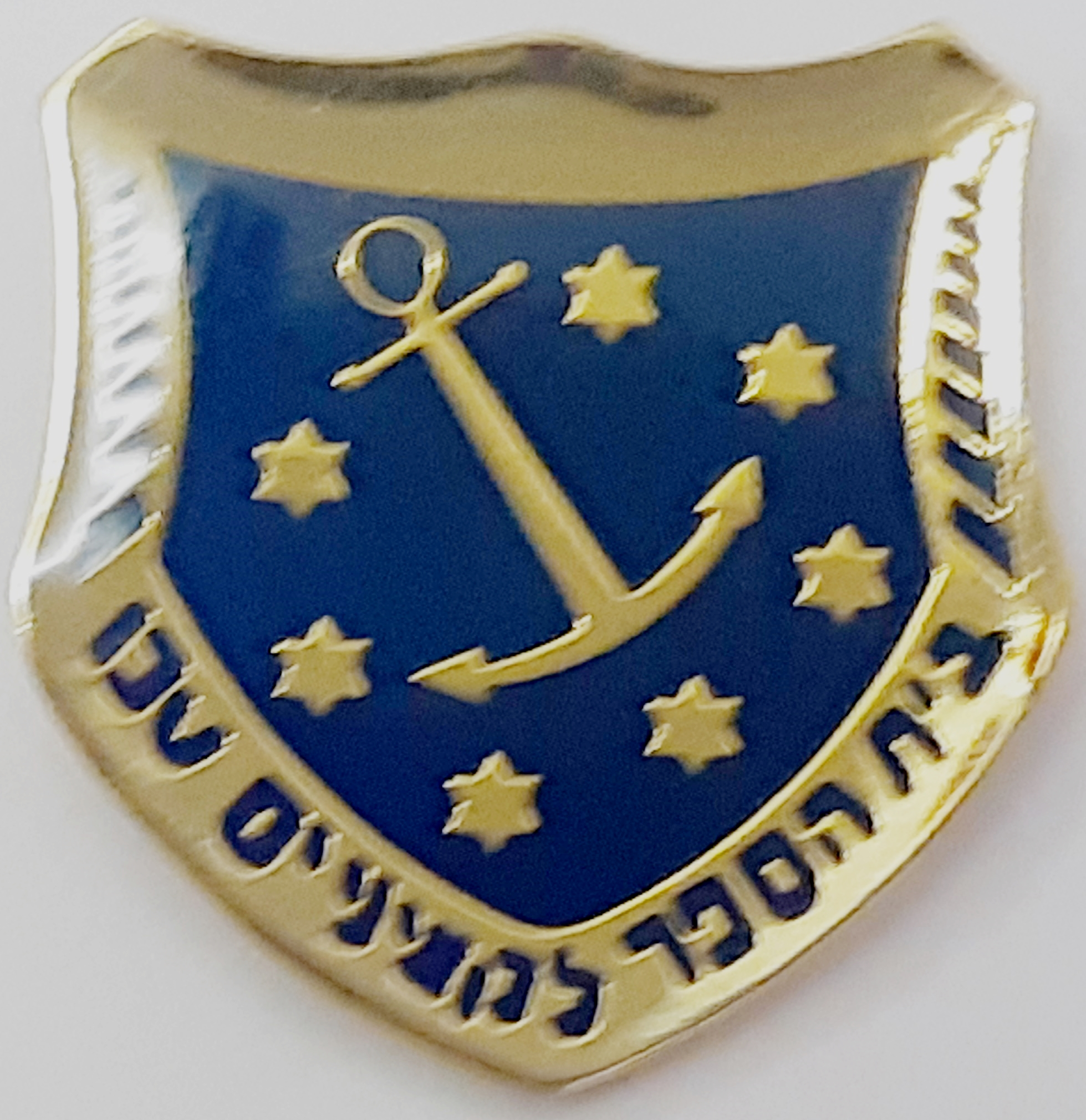 סיכת בוגרי בית הספר לקציני ים